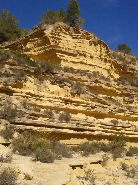 Río Seco (Alicante)